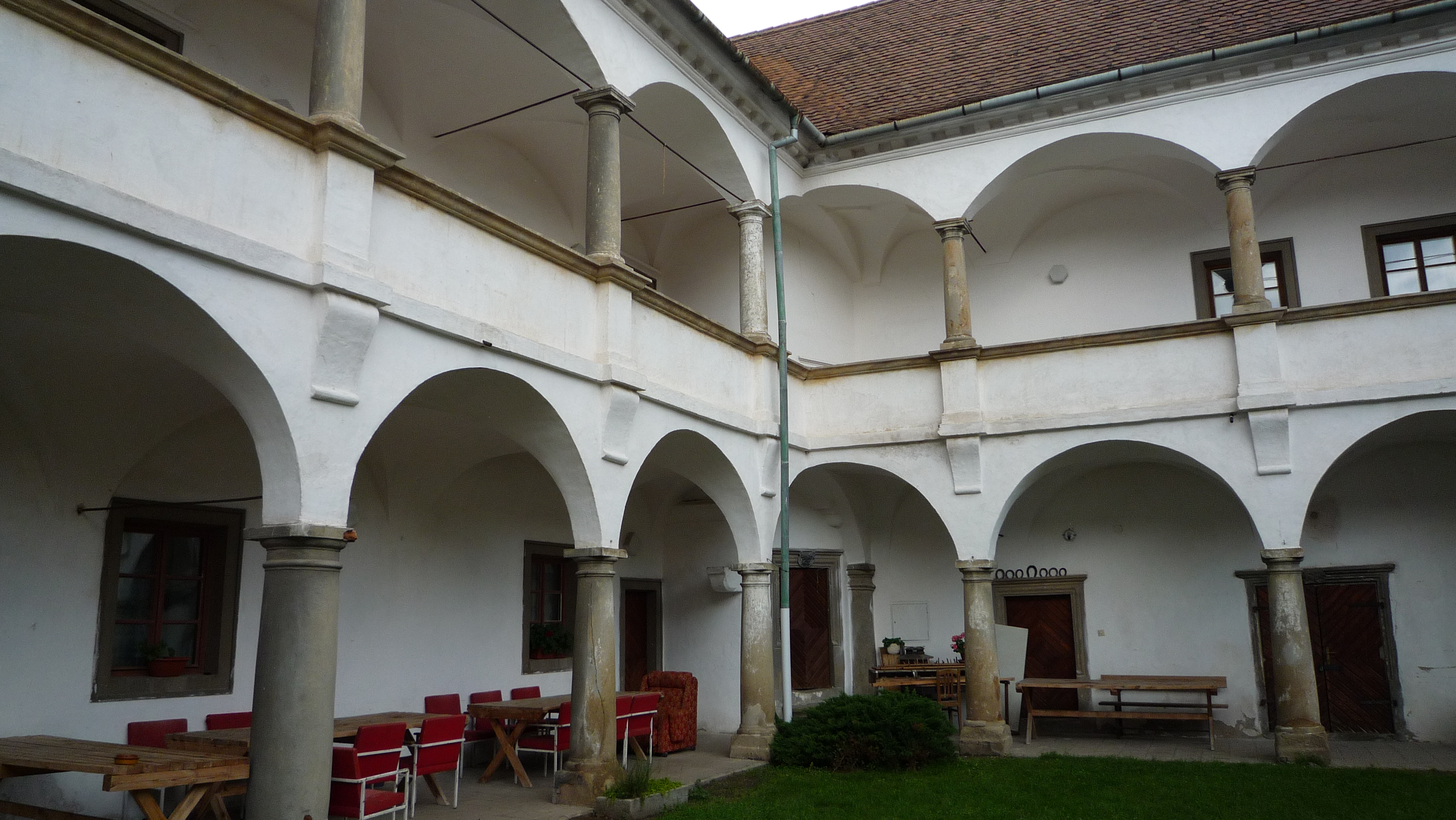 Zámek, Hrubšice-alibaba